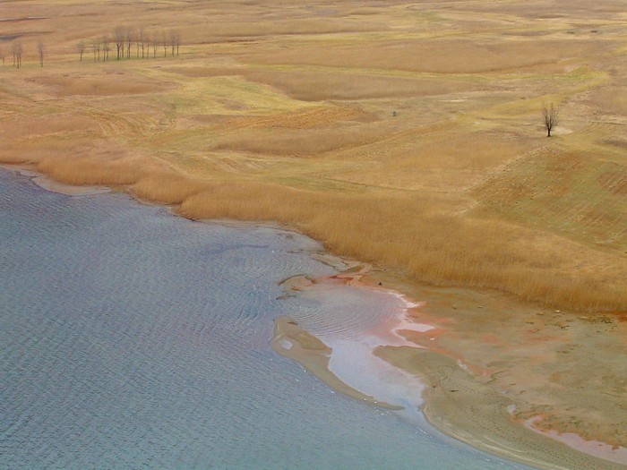 Lago di Como: Pian di Spagna selfmade picture taken in april 2004